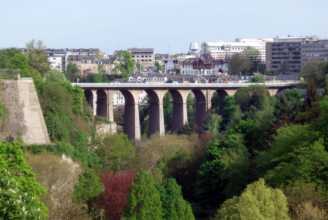 D'Passerelle, och nach Viaduc oder Al Bréck genannt, gebaut vun 1859-1861.